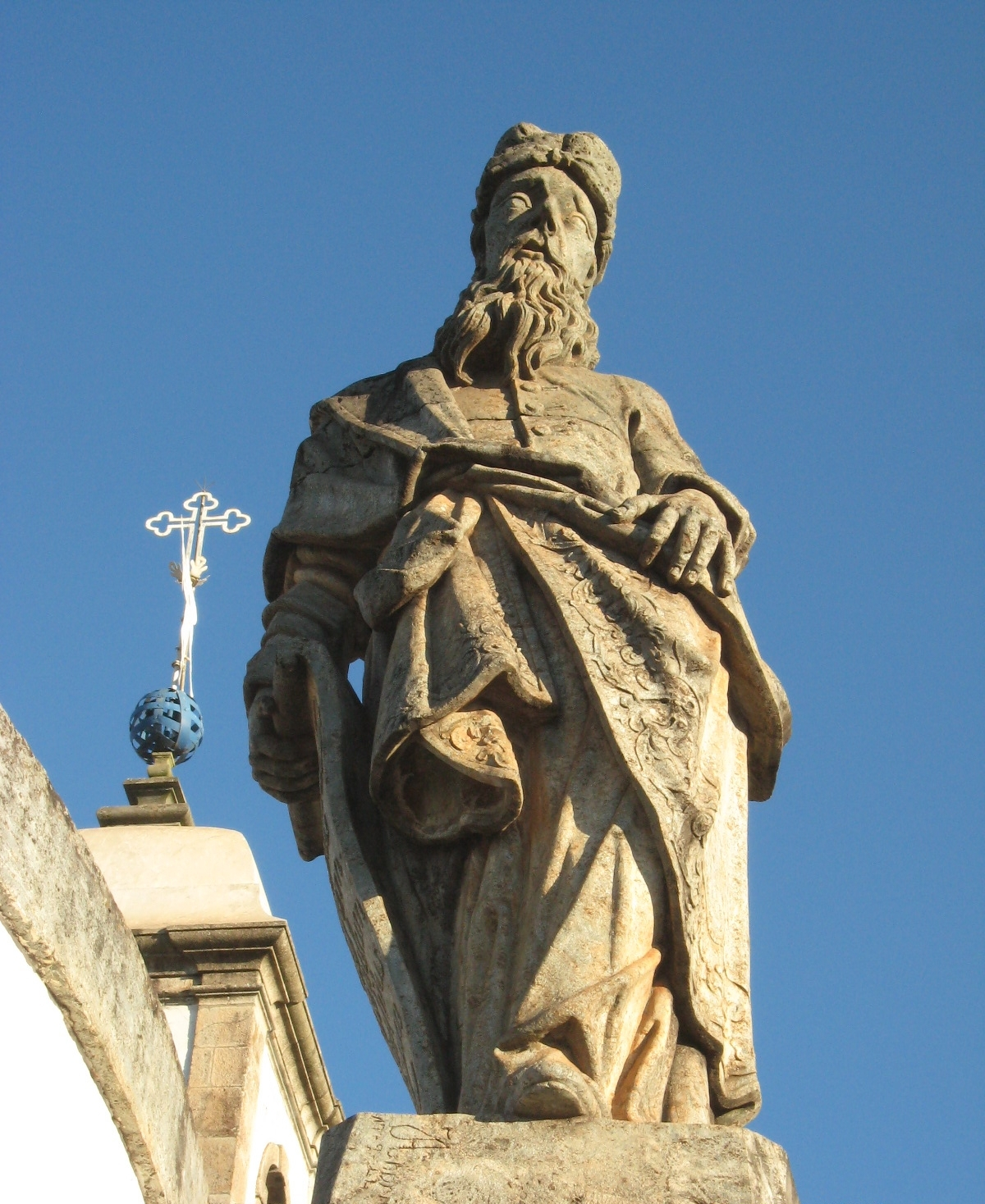 Profeta Naum - Doze profetas de Aleijadinho Congonhas Minas Gerais